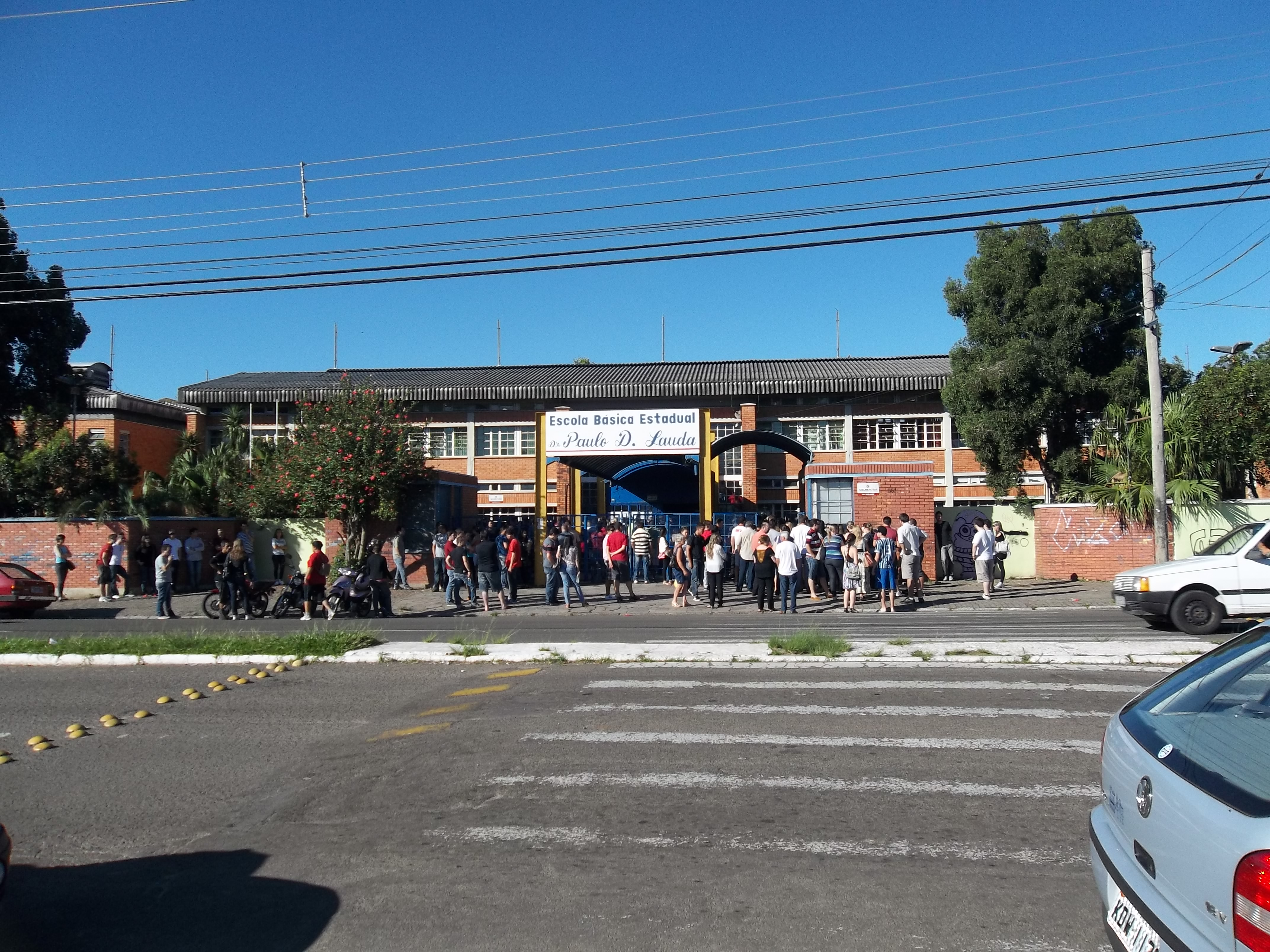 Escola Dr. Paulo Lauda. Tancredo Neves, Sede, Santa Maria, Rio Grande do Sul, Brasil.